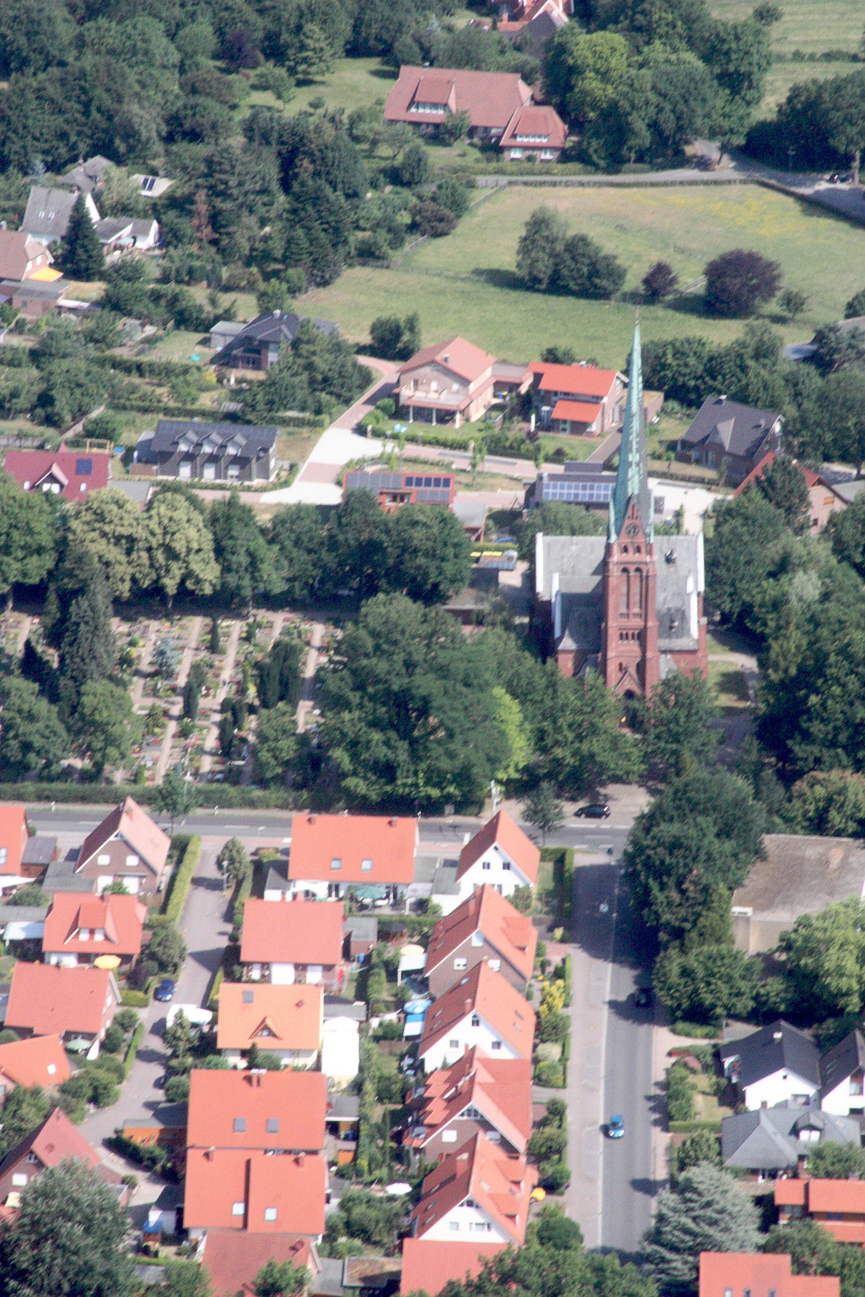 Luftaufnahmen Oldenburg (Oldenburg), mit Weiterflug nach Westen; 1500 Fuß Flughöhe; Juli 2010; Originalfoto bearbeitet: Tonwertkorrektur und Bild geschärft mit Hochpassfilter